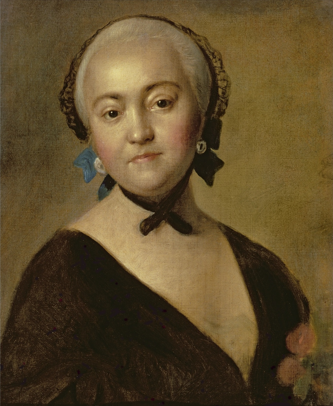 Портрет не окончен. В Каталоге 1980 не датирован. Датируется временем между датами приезда Ротари в Россию (1756) и исполнения гравюры и смерти императрицы (1761), вероятно, ближе к 1761, так как остался незаконченным. Ротари неоднократно писал Елизавету Петровну. После смерти художника в его мастерской осталось пять ее неоконченных портретов. Портрет „в черной кружевной мантилье" считался одним из лучших и, по мнению Штелина (Штелин 1990, с. 74), самых похожих портретов императрицы. По сведениям Ровинского, портрет после смерти императрицы принадлежал графу И. И. Шувалову (Ровинский. Портреты, т. 2, стб 942). Гравирован Е. П. Чемесовым (1761).